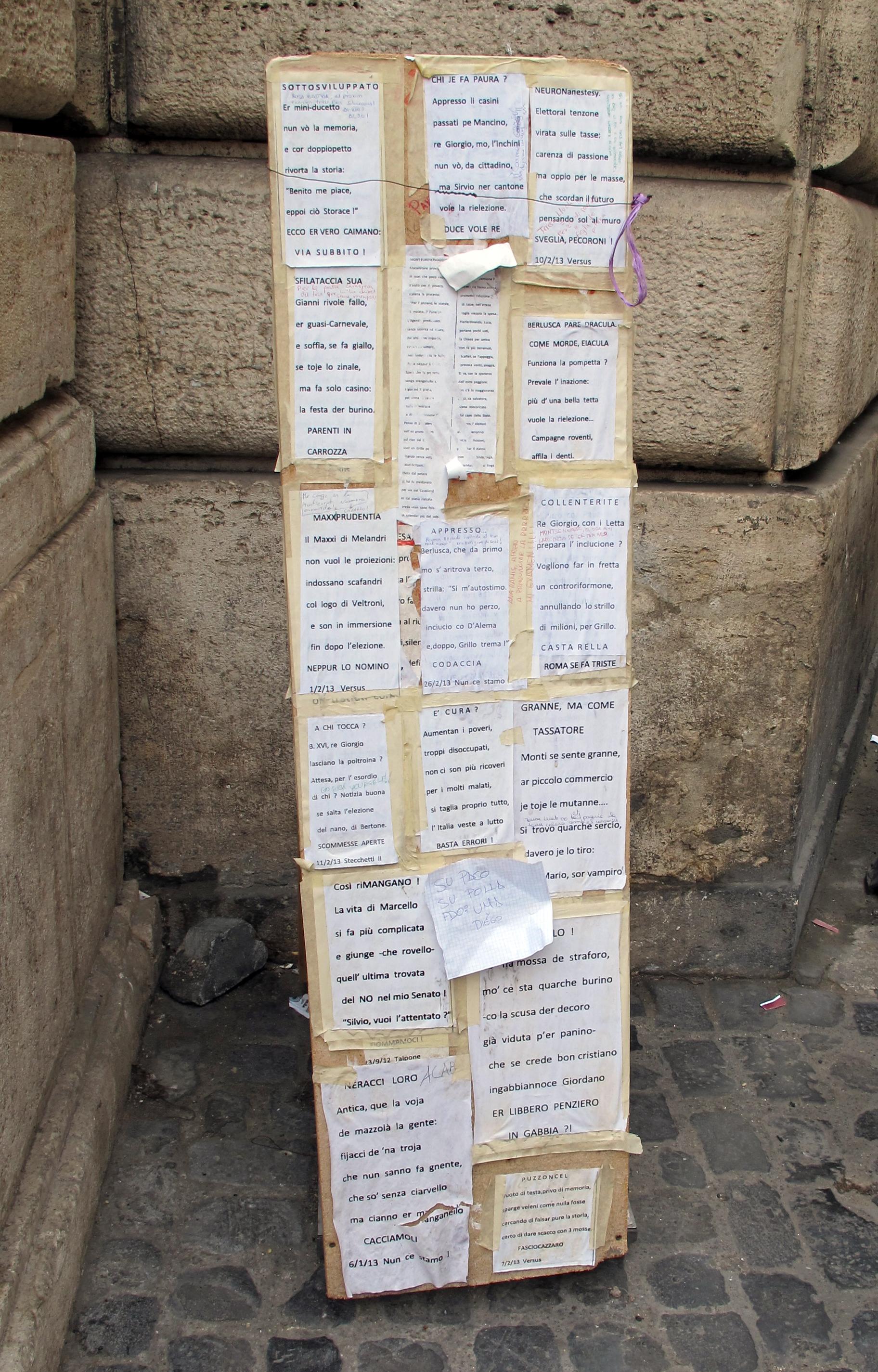 Statua di pasquino, pasquinate